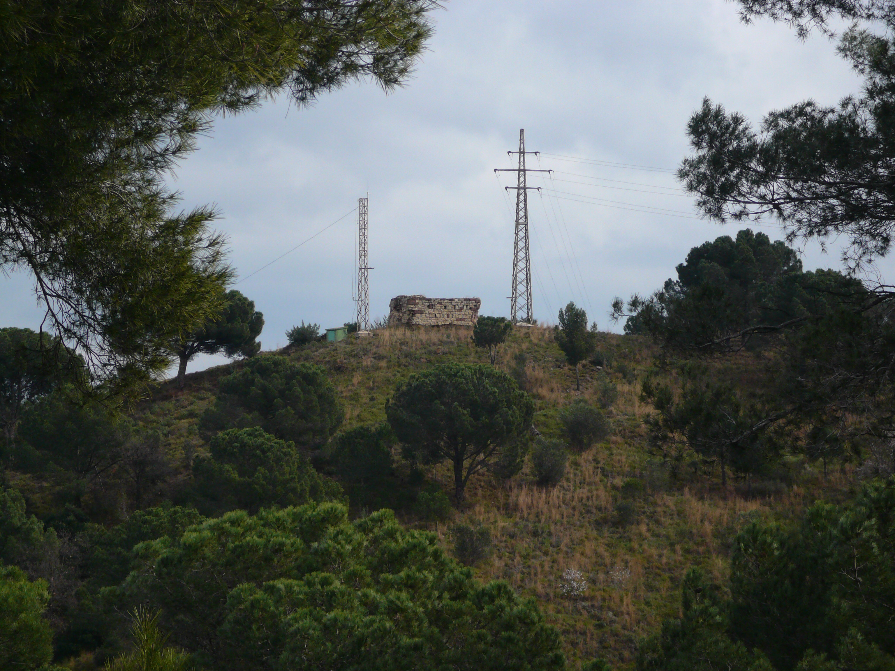 Serrat de les Torres (Martorell)